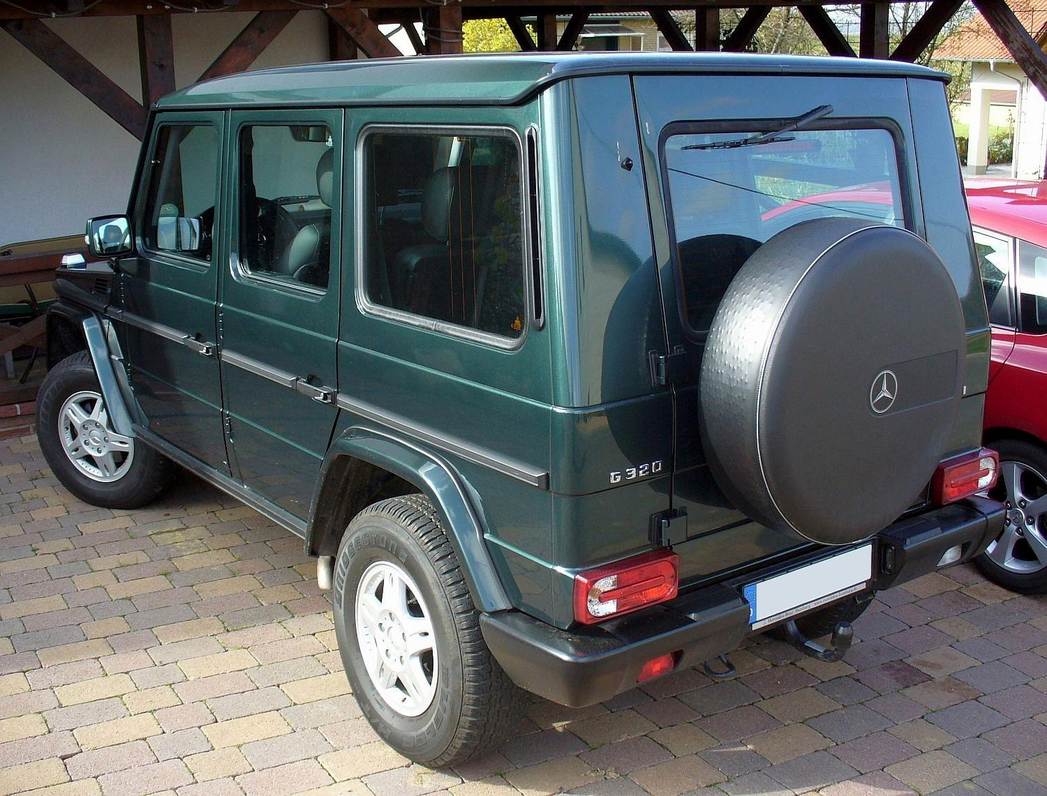 Mercedes-Benz G 320 CDI